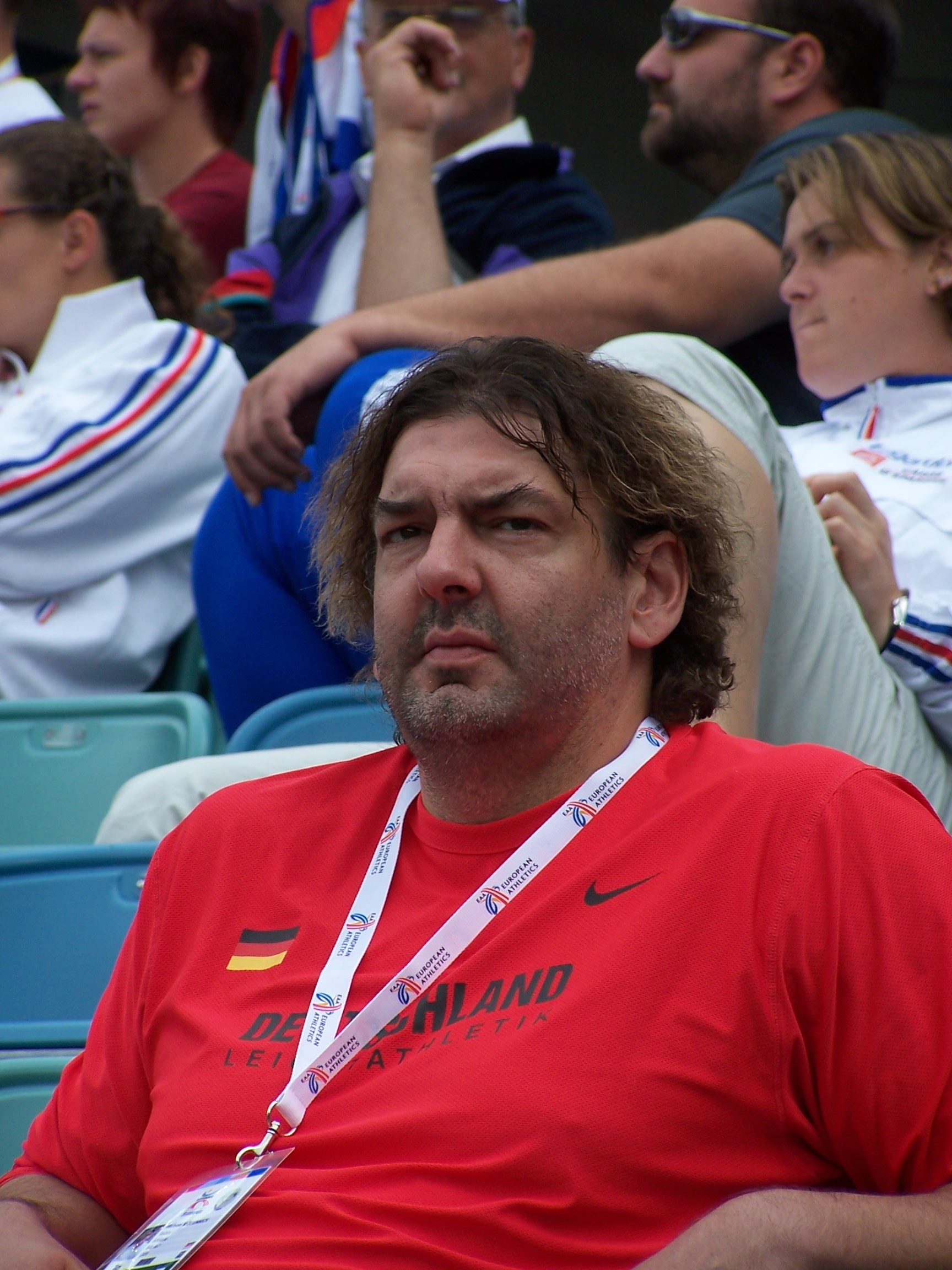 Michael Möllenbeck dopo le qualificazioni del lancio del disco ai campionati europei di Goteborg 2006